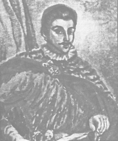 Киевский князь Семён Олелькович (около 1420-1470)